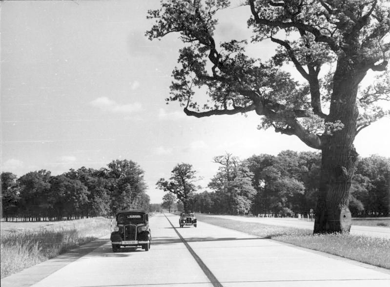 Reichsautobahn Berlin-München Durch die Elb- und Muldenniederung führenden Strecke der RAB. südöstlich Dessau. Auf dem Mittelstreifen hat man die alten Eichen, das Wahrzeichen des parkähnlichen Wiesengeländes stehen gelassen. Fot. Schw. Juni 1939